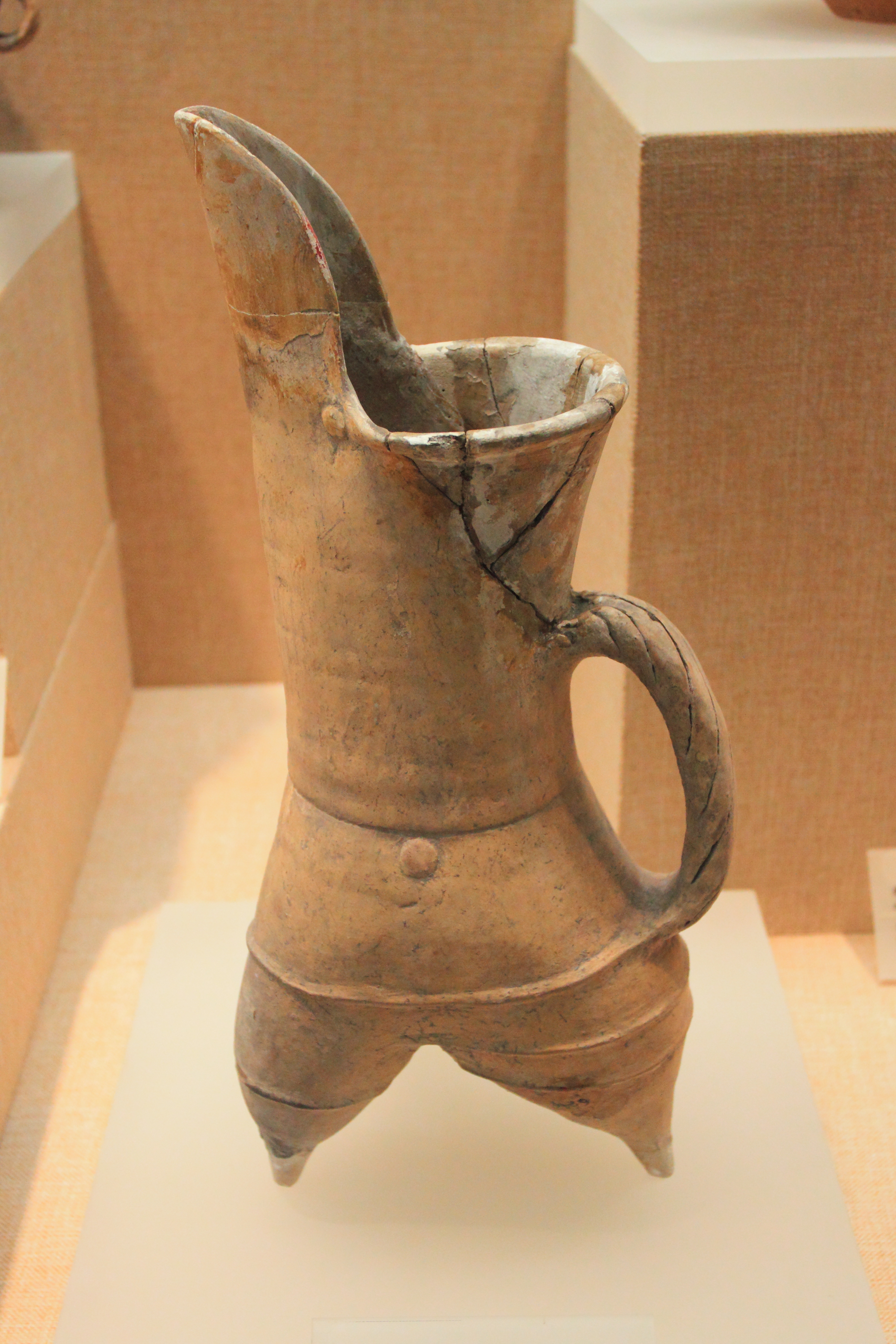 广东省博物馆 ——“土火之艺”（馆藏历代陶瓷展览）—— 山东龙山文化白陶鬹，新石器时代（公元前2500～公元前2000）